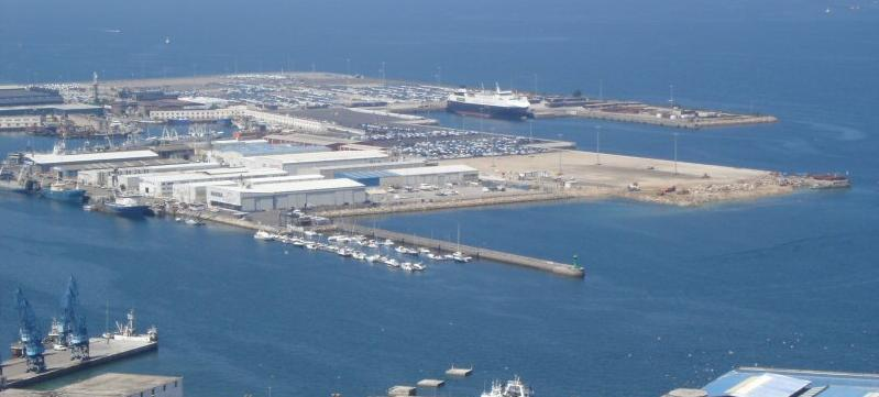 Porto de Bouzas, Vigo, Galiza, Espanha. Julho 2004 João Méndez